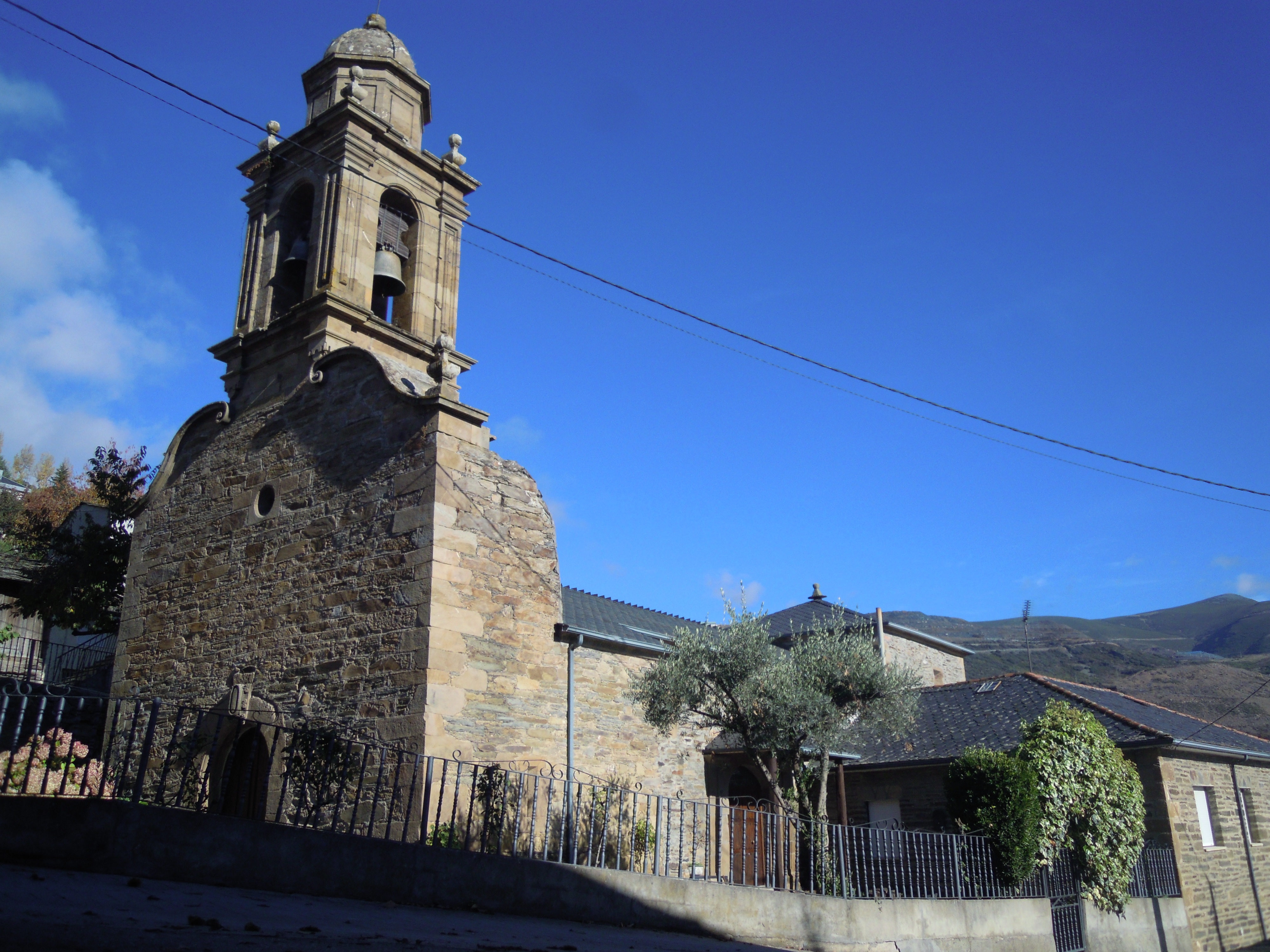 Igrexa parroquial de Casaio (Carballeda de Valdeorras)